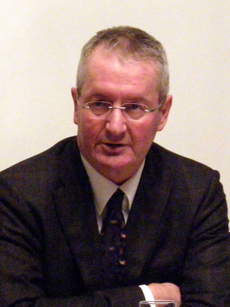 Göttingeni ülikooli professor Eberhard Winkler Tartus